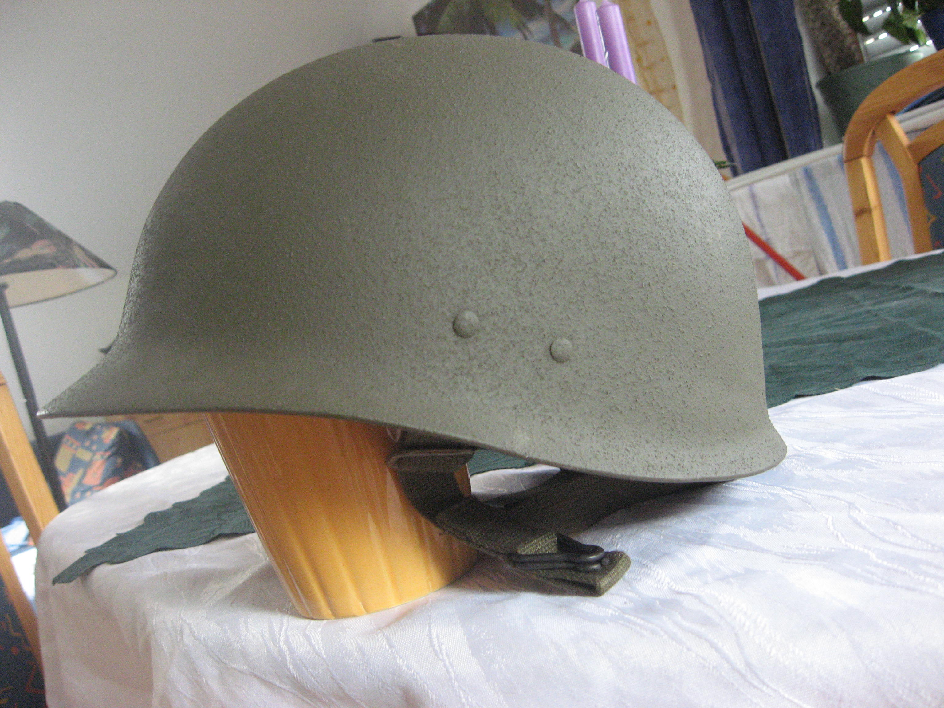 Stahl- bzw. Gefechtshelm der Bw, altes Modell, mit Nackenriemen